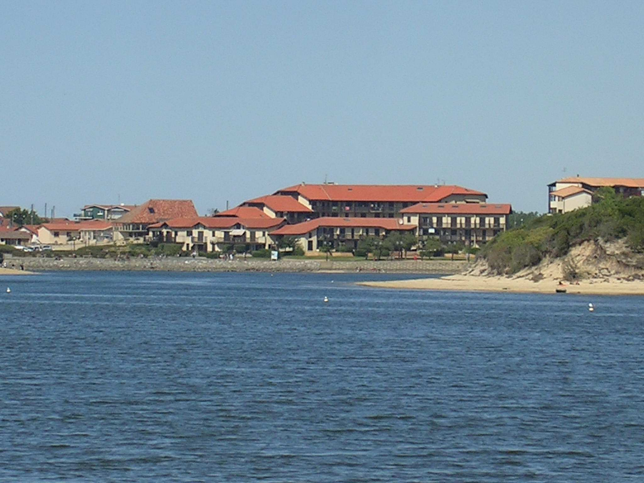 Vieux Boucau (Port d'Albret), vu de Soustons.